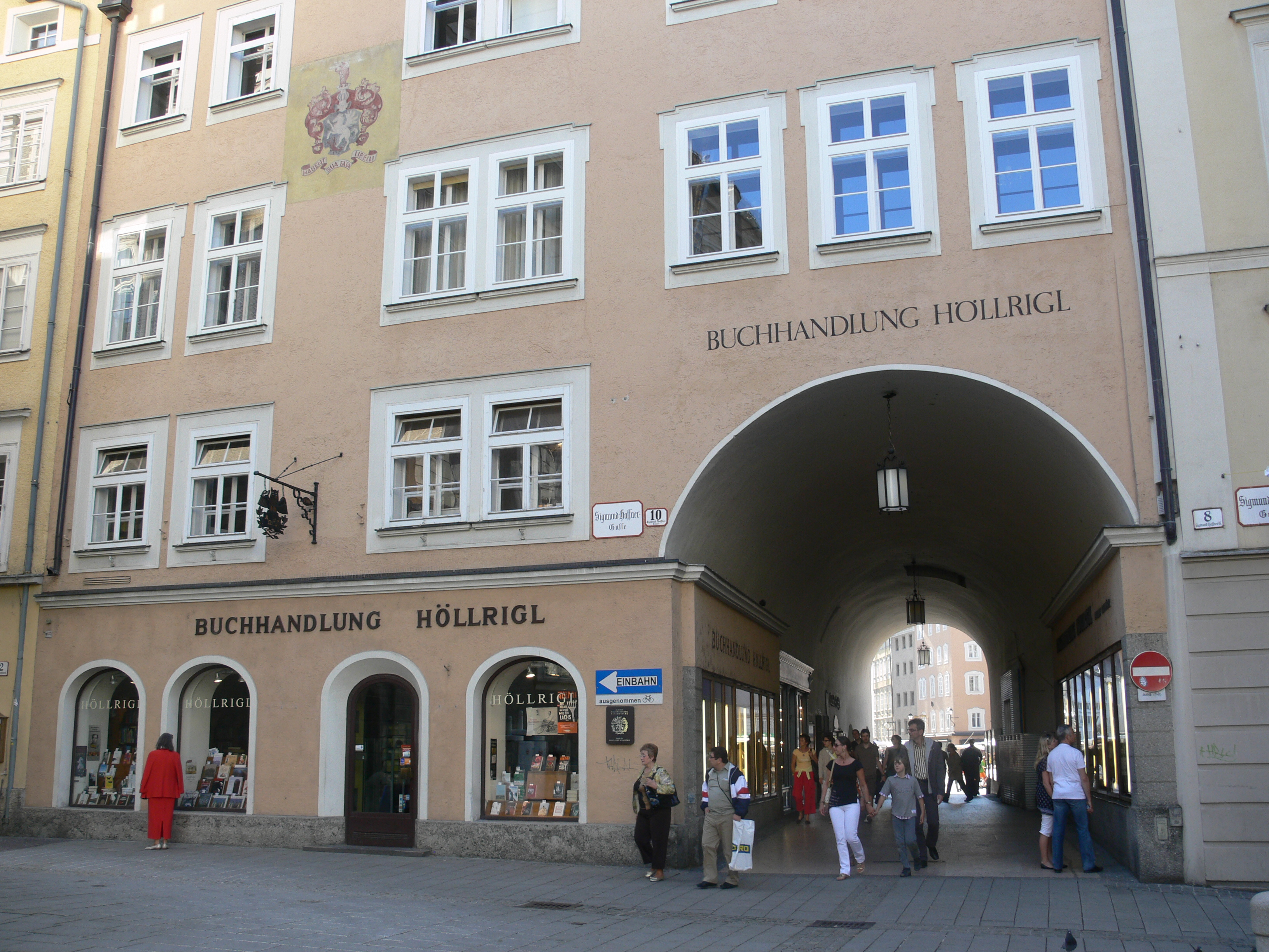 "Ritzerhaus" mit Buchhandlung Höllrigl, Sigmund-Haffner-Gasse 10 (am Durchgang zum Universitätsplatz), Salzburg; laut Schild Älteste Buchhandlung Österreich